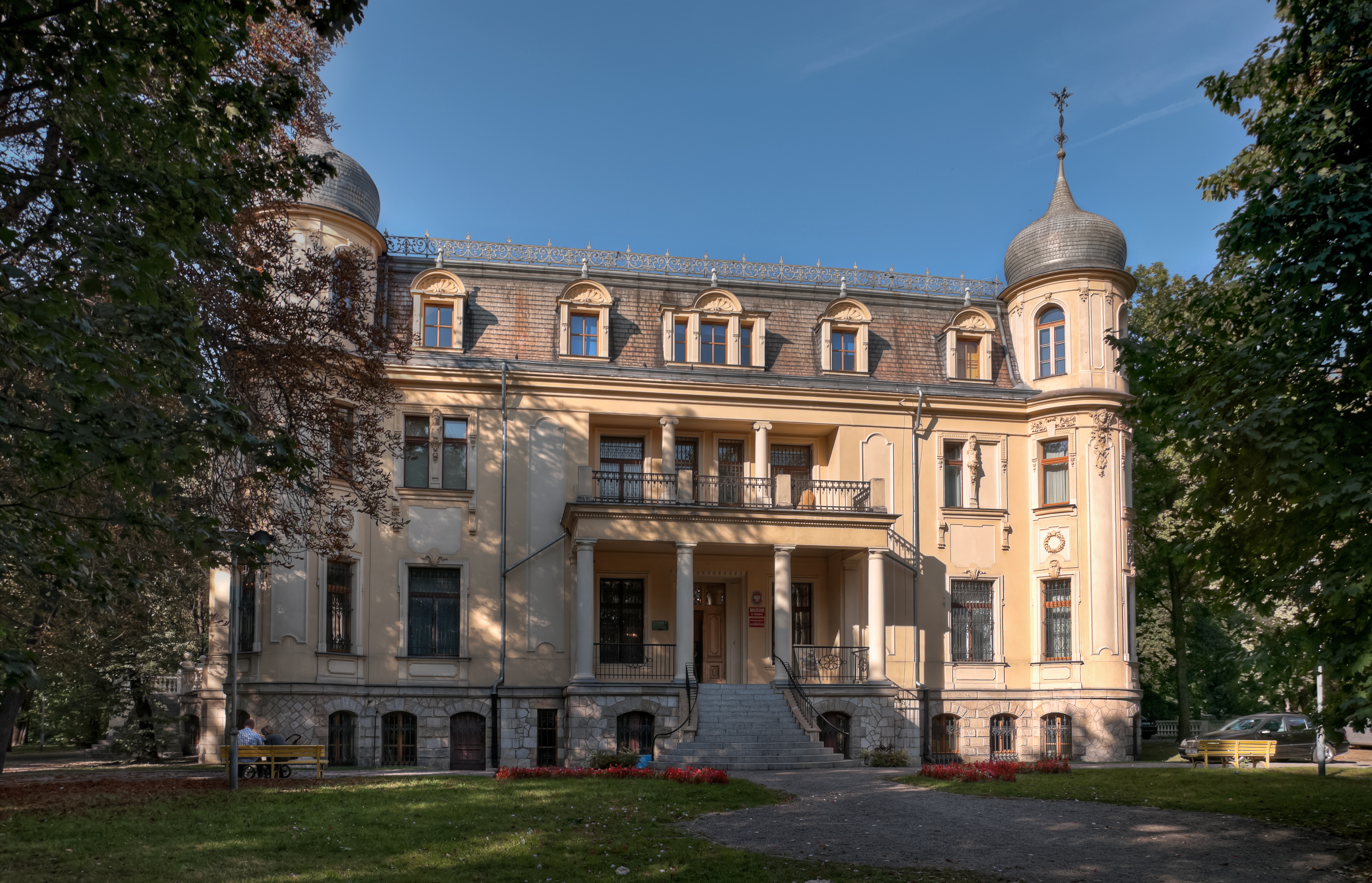 Sosnowiec - pałac główny w zespole pałacowym Schöna